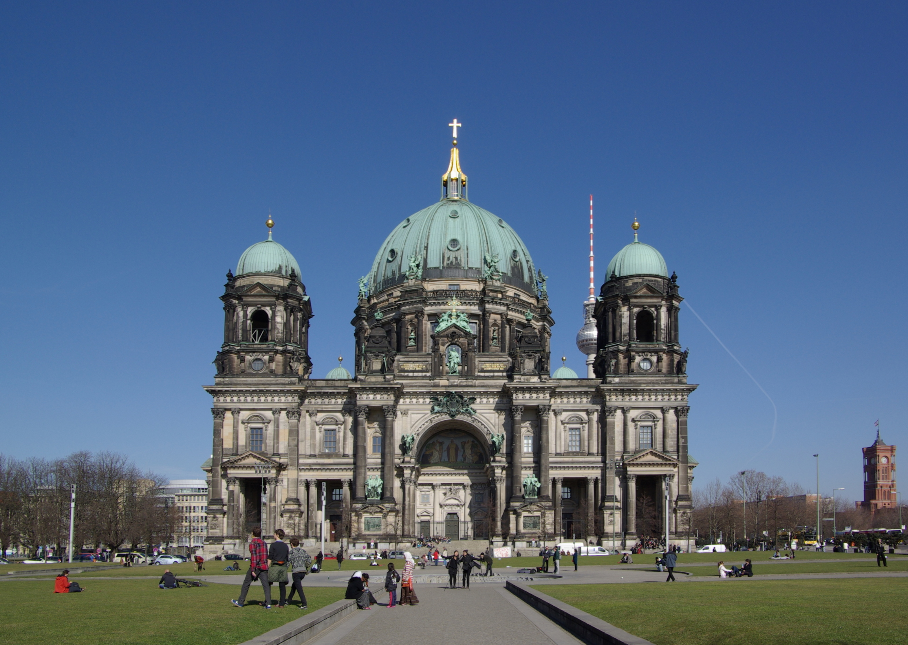 Berliner Dom, Fassade von Südwest, im Hintergrund der Fernsehturm, rechts der Turm des Roten Rathauses